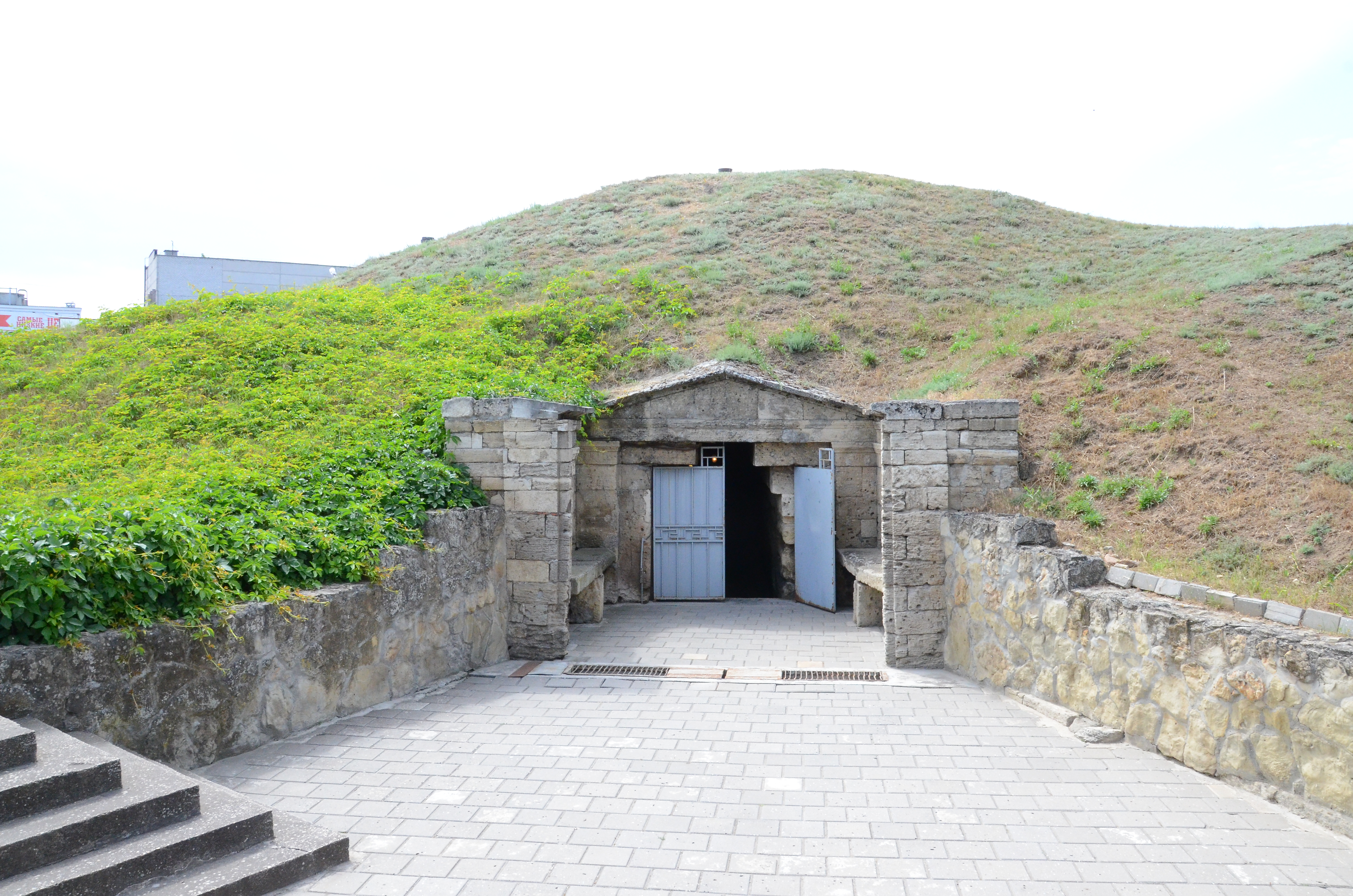 Мелек-Чесменский курган